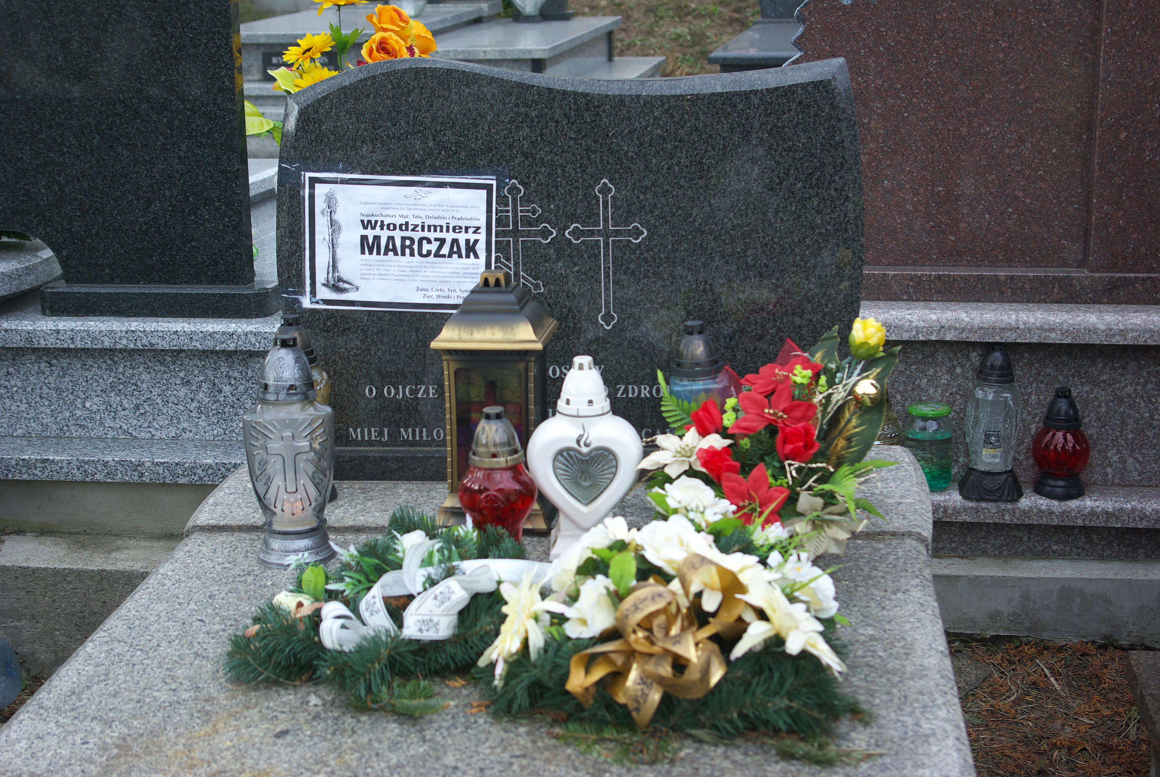 Nagrobek Włodzimierza Marczaka a na Cmentarzu Centralnym w Sanoku.